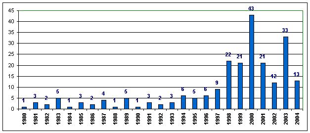 Wykres przedstawiający częstotliwość odsłaniania papieskich pomników w Polsce w latach 1980-2005. Oprac. Kazimierz S. Ożóg